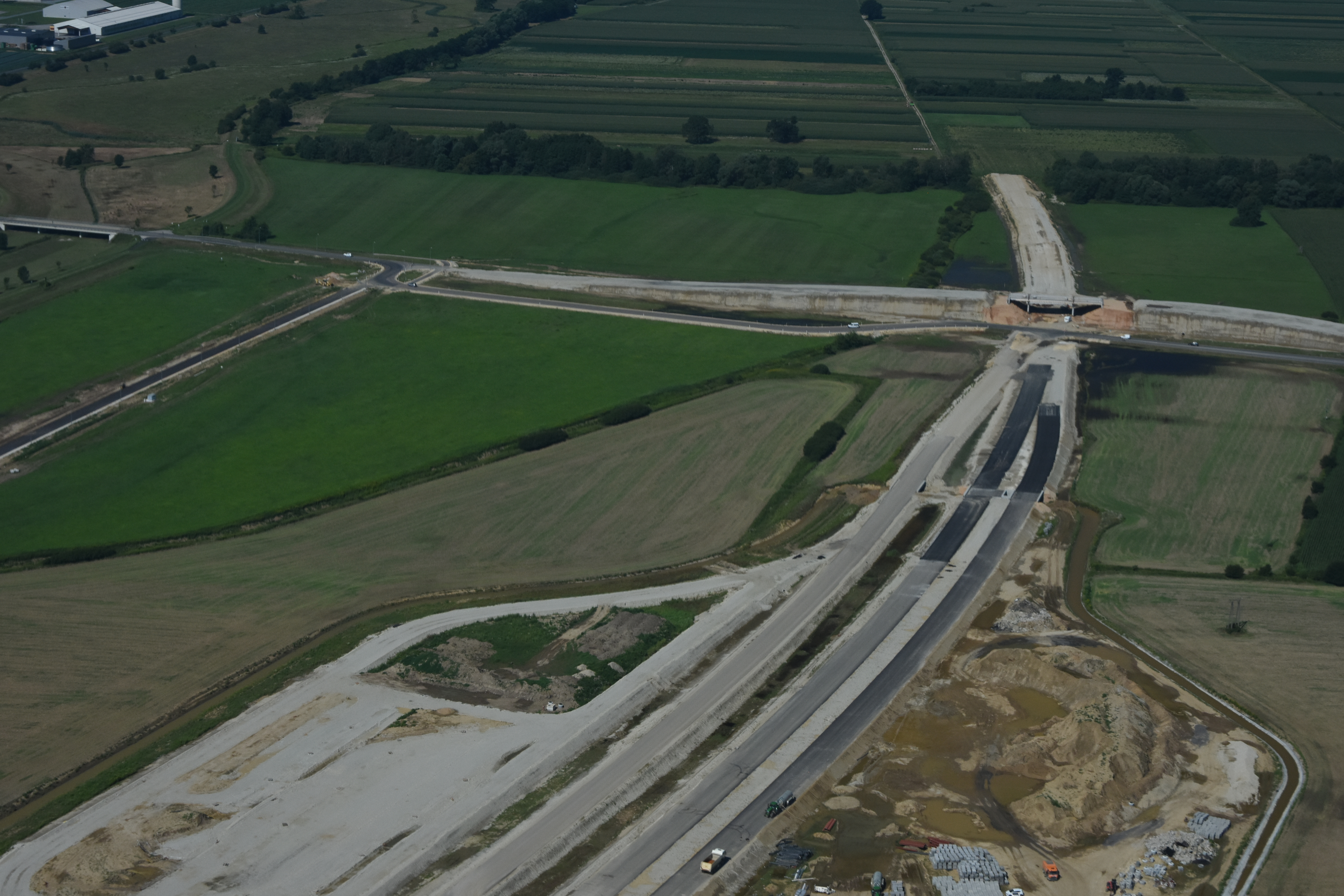 Aerial photographs Fürstenfelder Schnellstraße S7